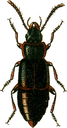 This file has been extracted from another file: Jacobs15.jpg